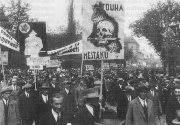 Manifestace KSČ v Brně roku 1927